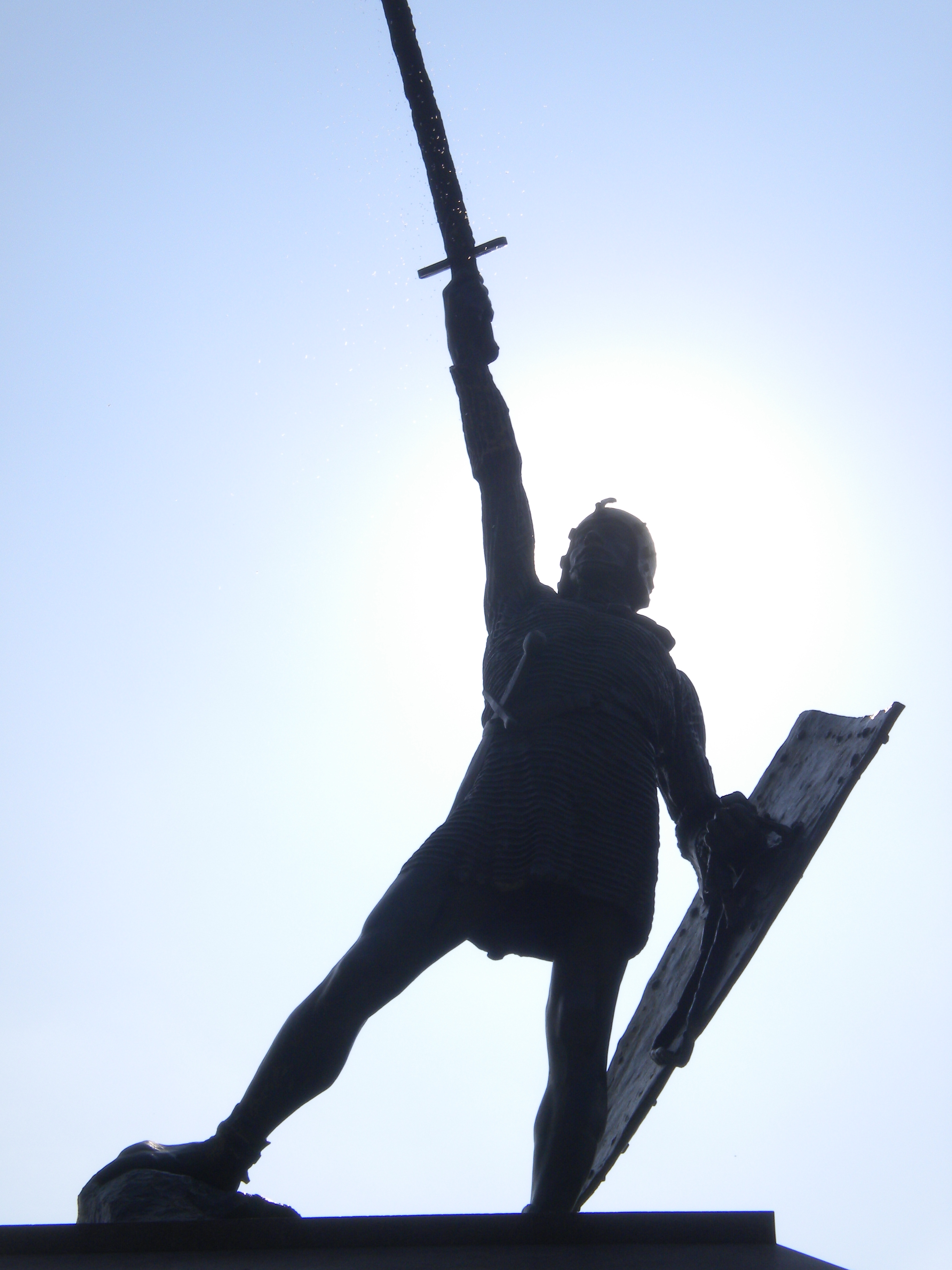 Monumento "Alberto da Giussano" This is a photo of a monument which is part of cultural heritage of Italy.